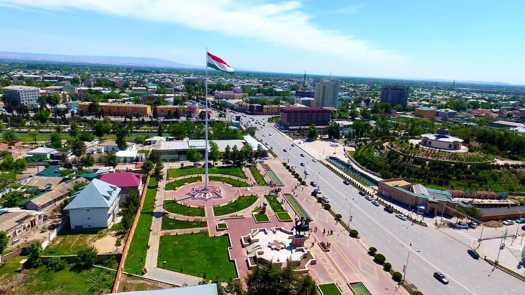 Курган-Тюбе Бохтар 2018